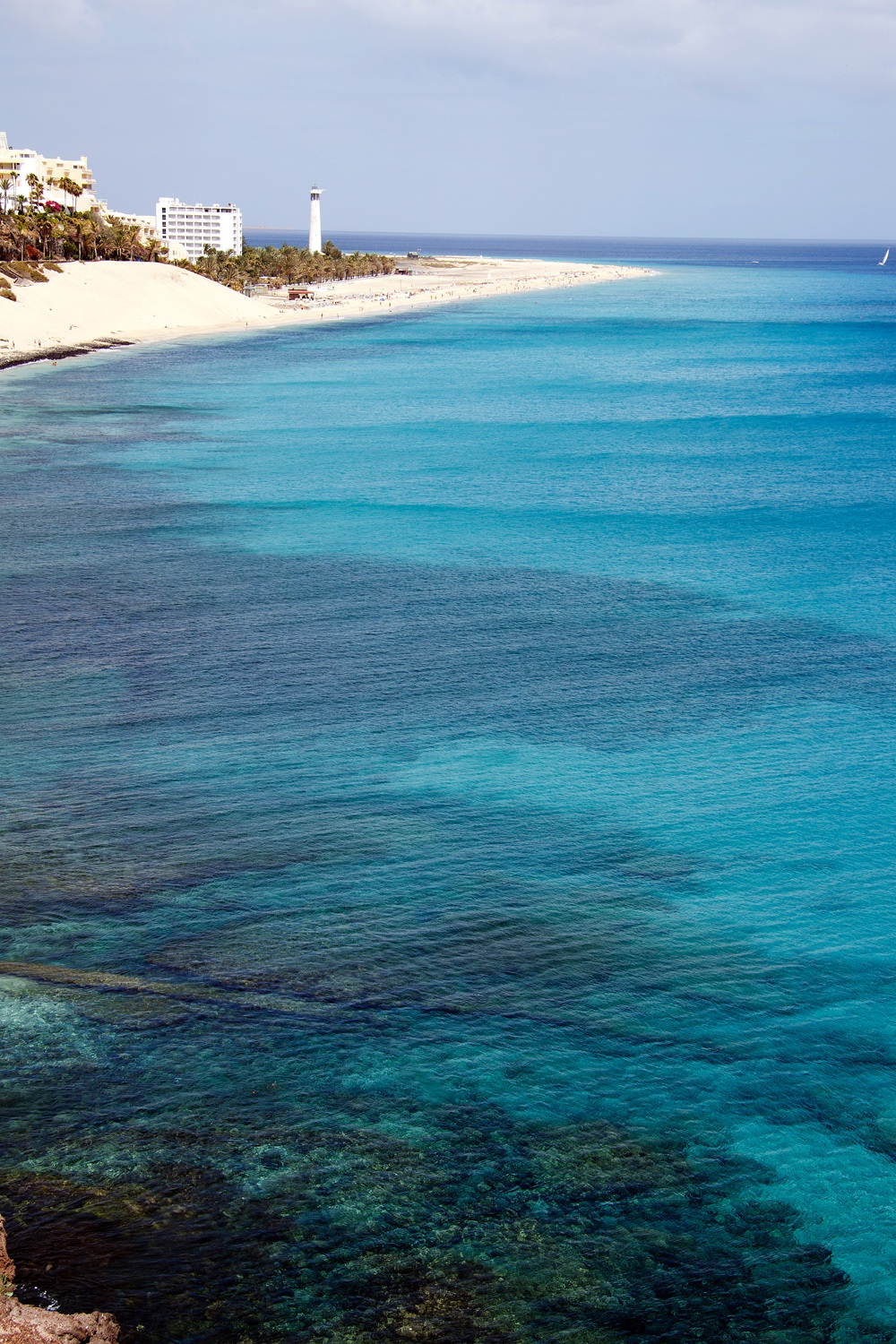 Strand und Leuchtturm von Morro Jable, Halbinsel Jandia, Fuerteventura, Kanarische Inseln, Spanien